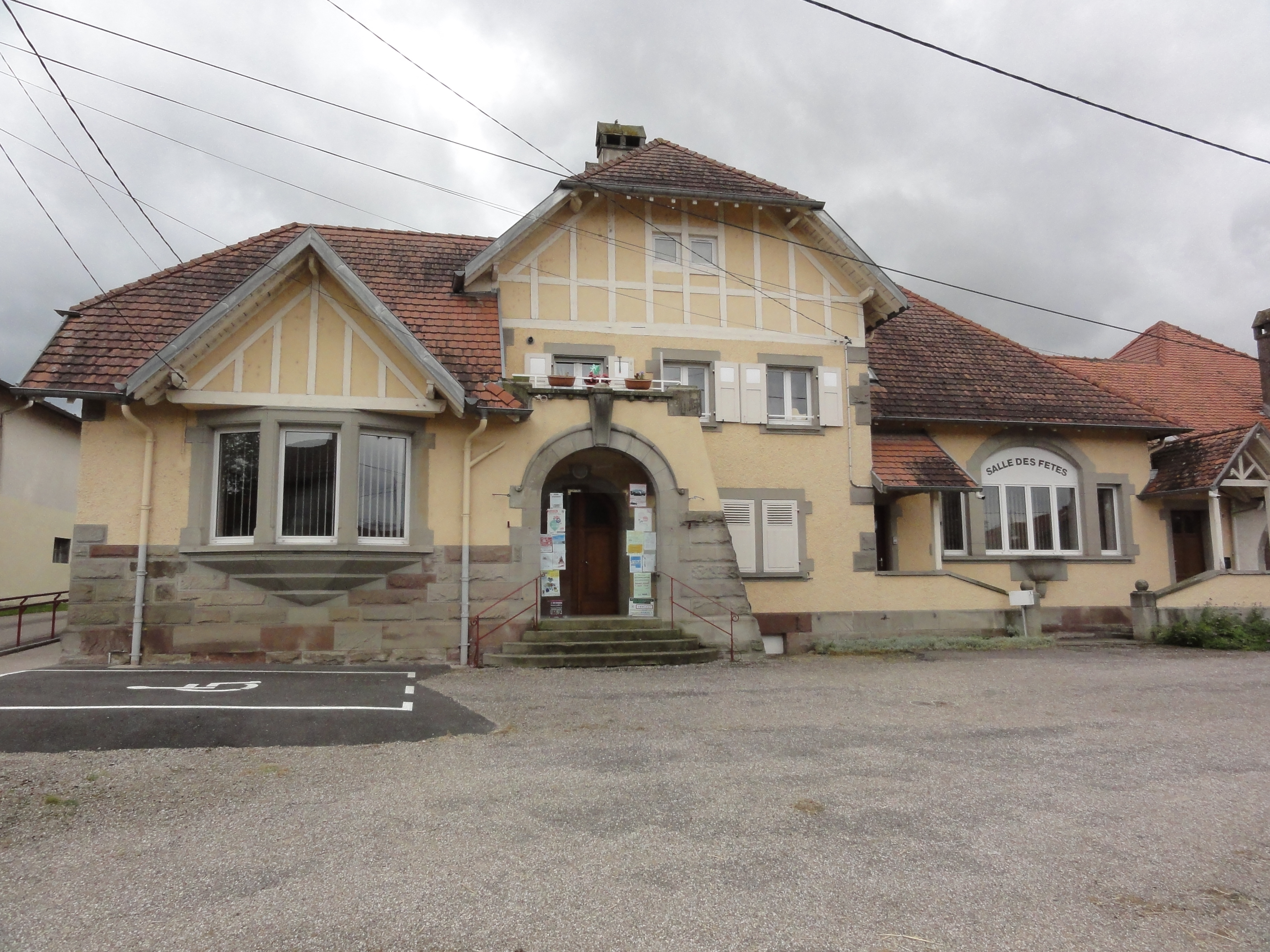 Mouacourt (M-et-M) mairie